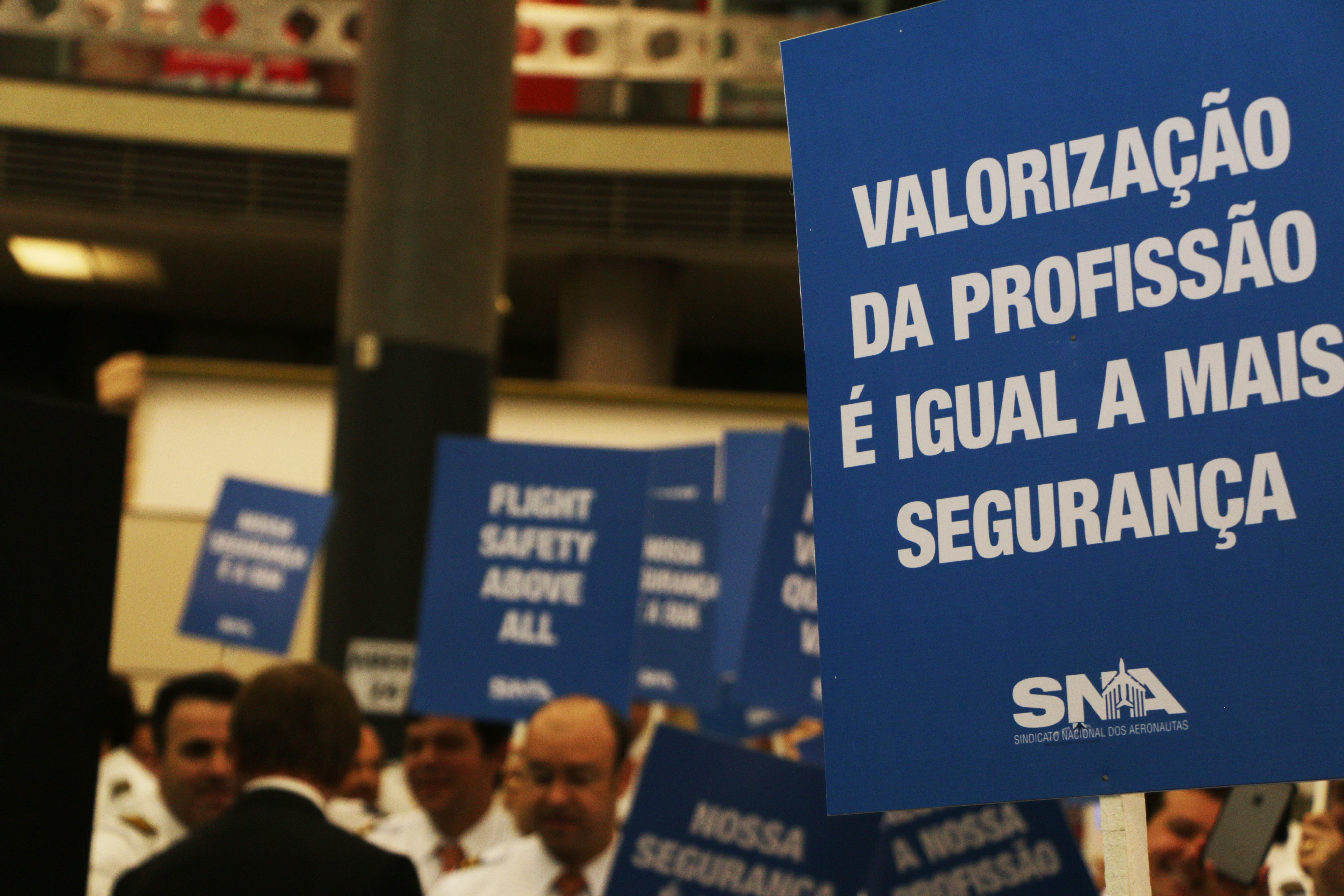 A fotografia de 3 de fevereiro de 2016 é um registro da paralisação dos Aeronautas em prol da CCT. Os aeronautas reivindicavam por garantia de escalas justas, melhores condições de trabalho e pela segurança de voo.